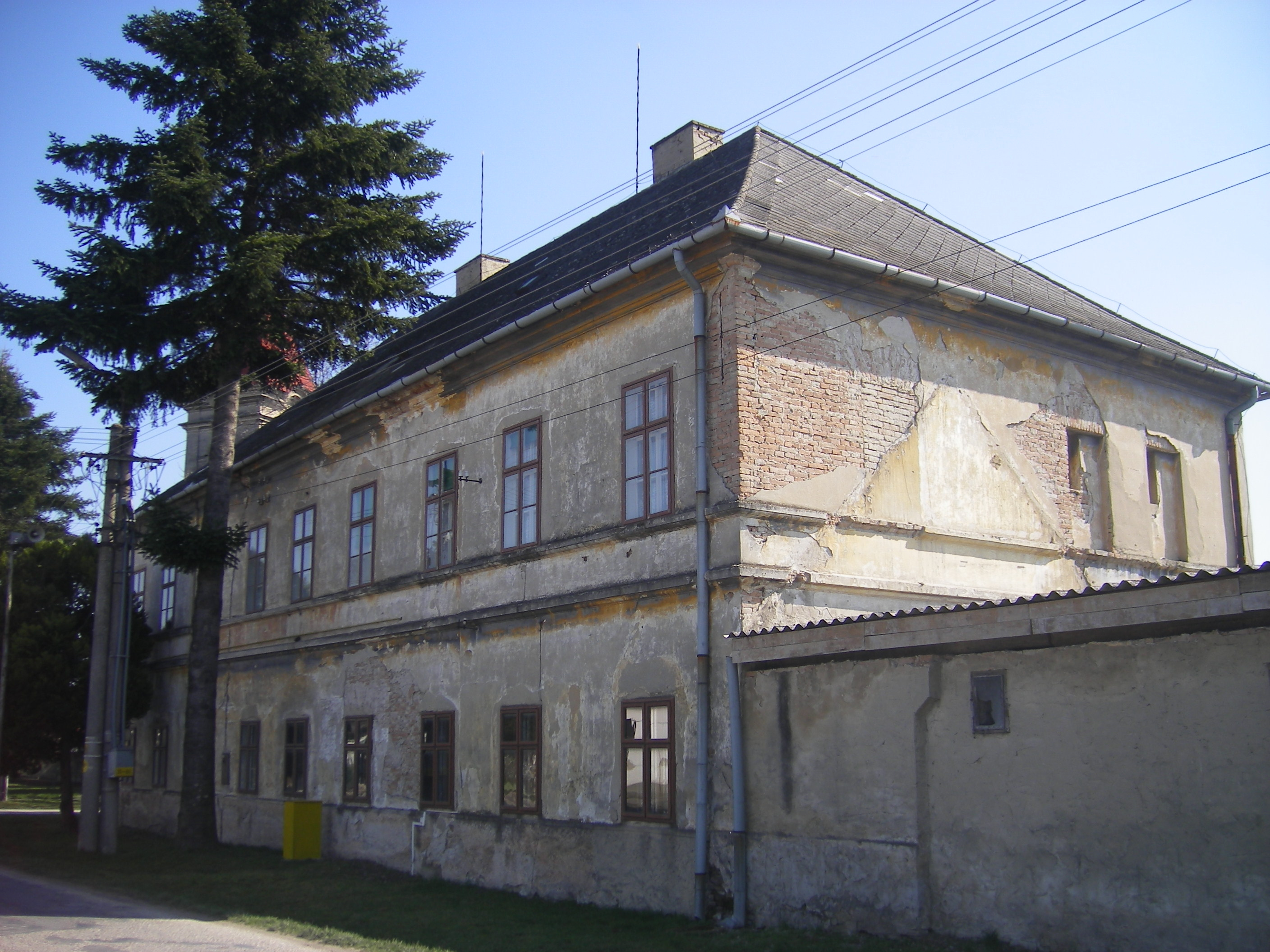 Komáromfüss, az egykori bencés kolostor épülete (a "kastély")